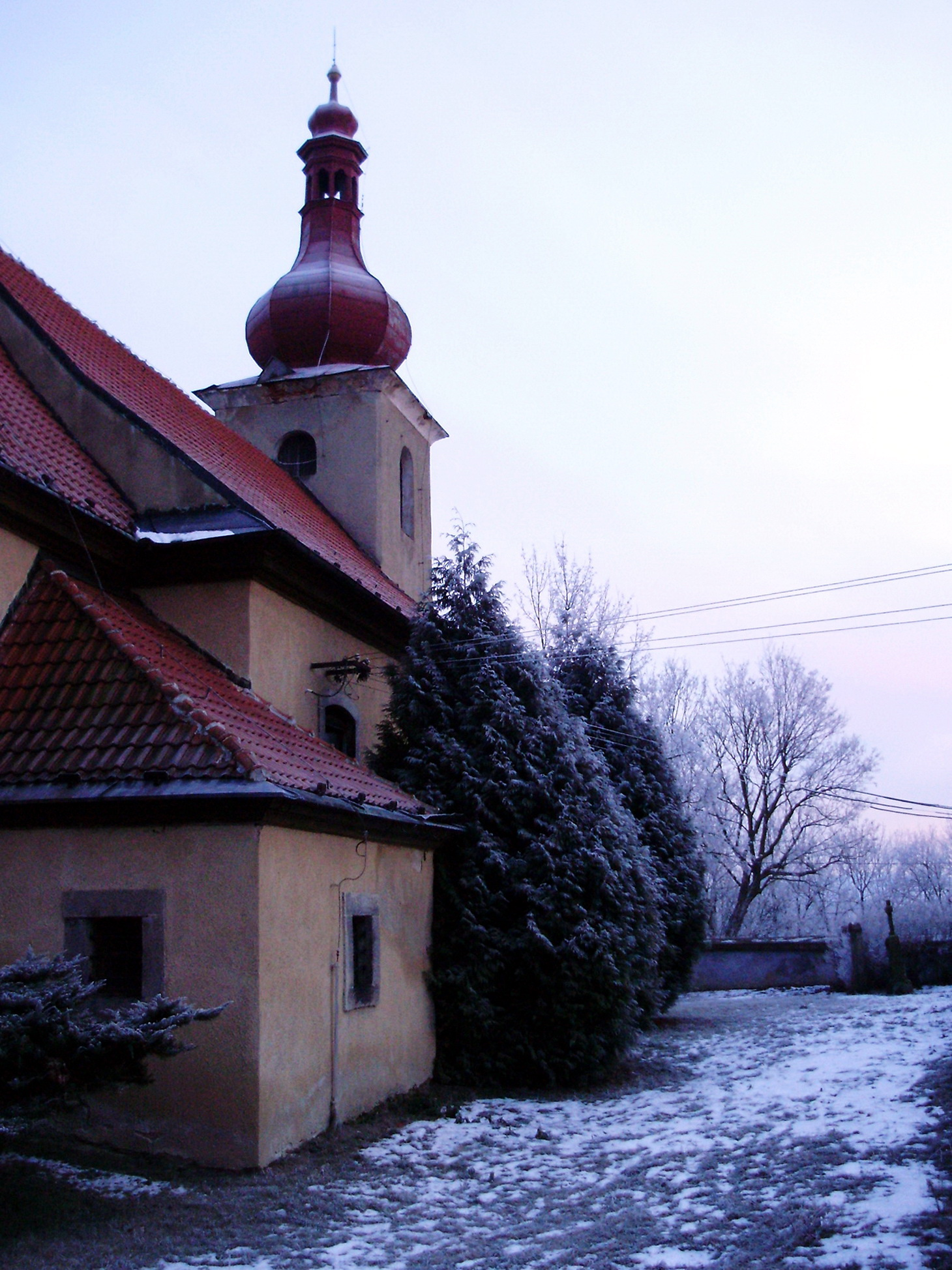 Die St. Oswaldkirche in Nebanitz.